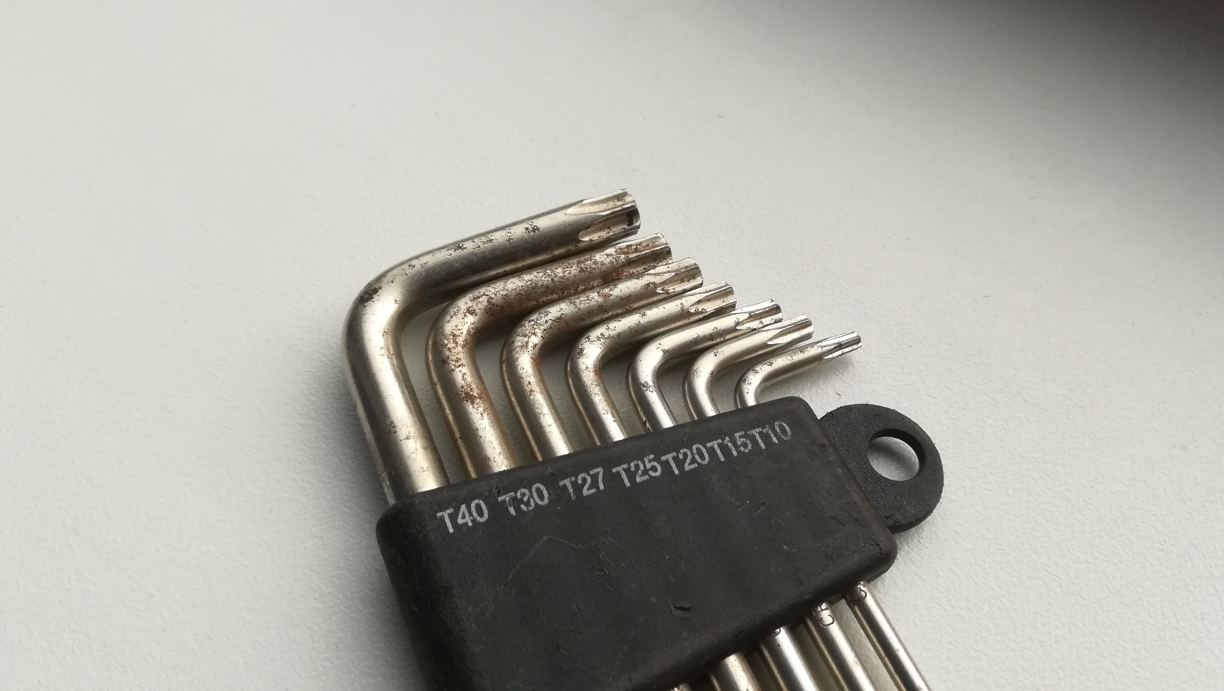 Tähtvõtmete komplekt